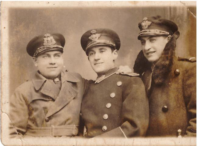 Romeo Popescu impreuna cu prietenul sau Vasile Ionescu (mijloc), viitor comandant al Scolii militare de la Tecuci.